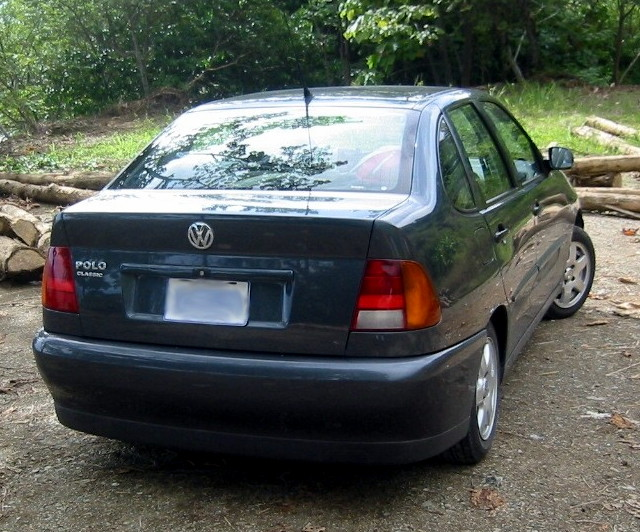 VW Polo Classic 1.6cc, 2001 model. Picture taken near the Costanera road, Costa Rican Pacific coast - Puntarenas, Costa Rica. Author: Asdrúbal Sanabria Solano